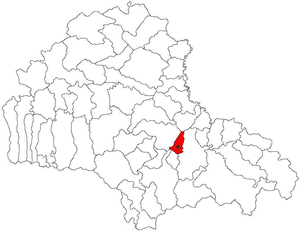 Categorie:Hărţi ale judeţului Braşov